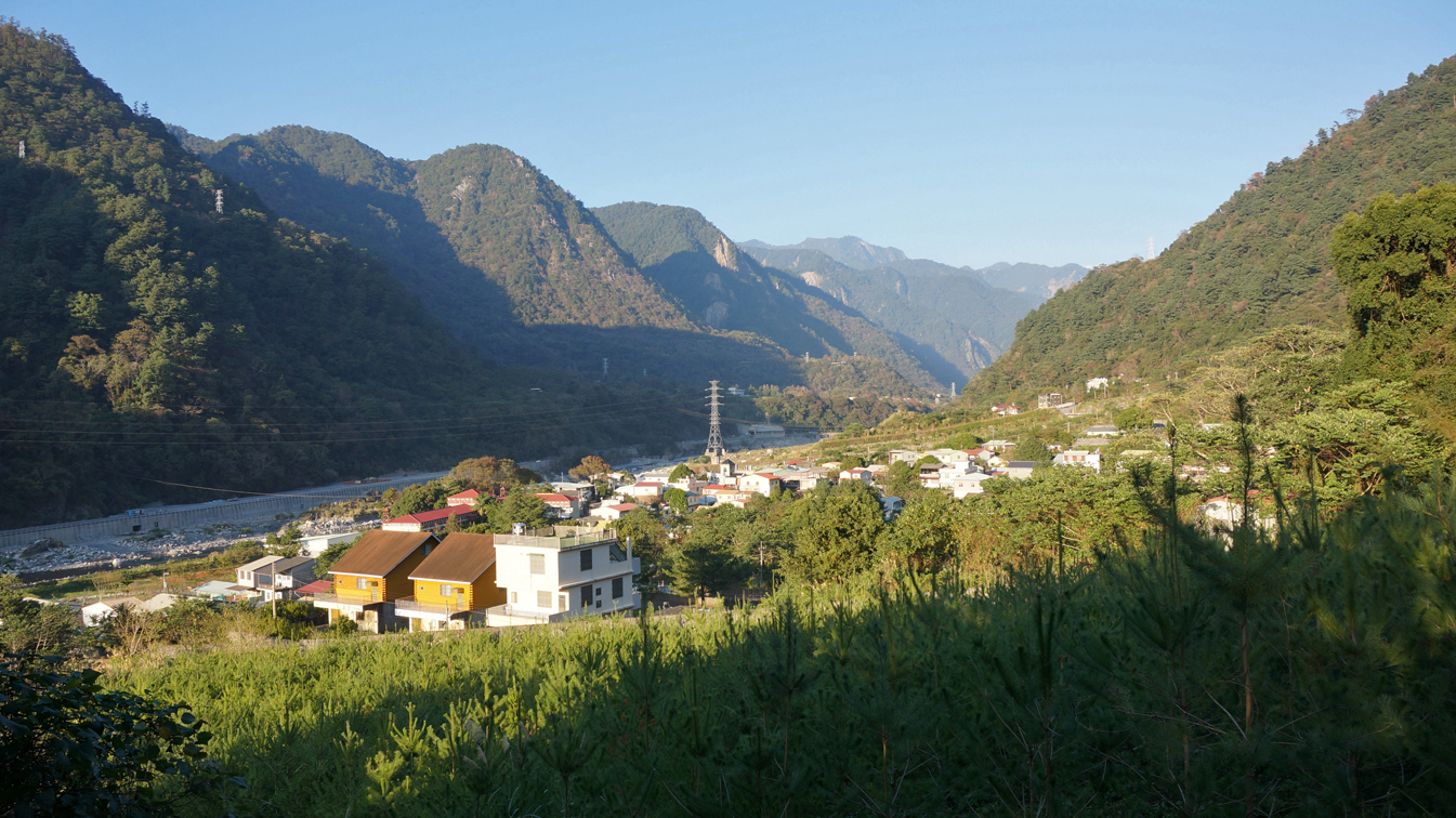 中文（台灣）: 台中松鶴部落